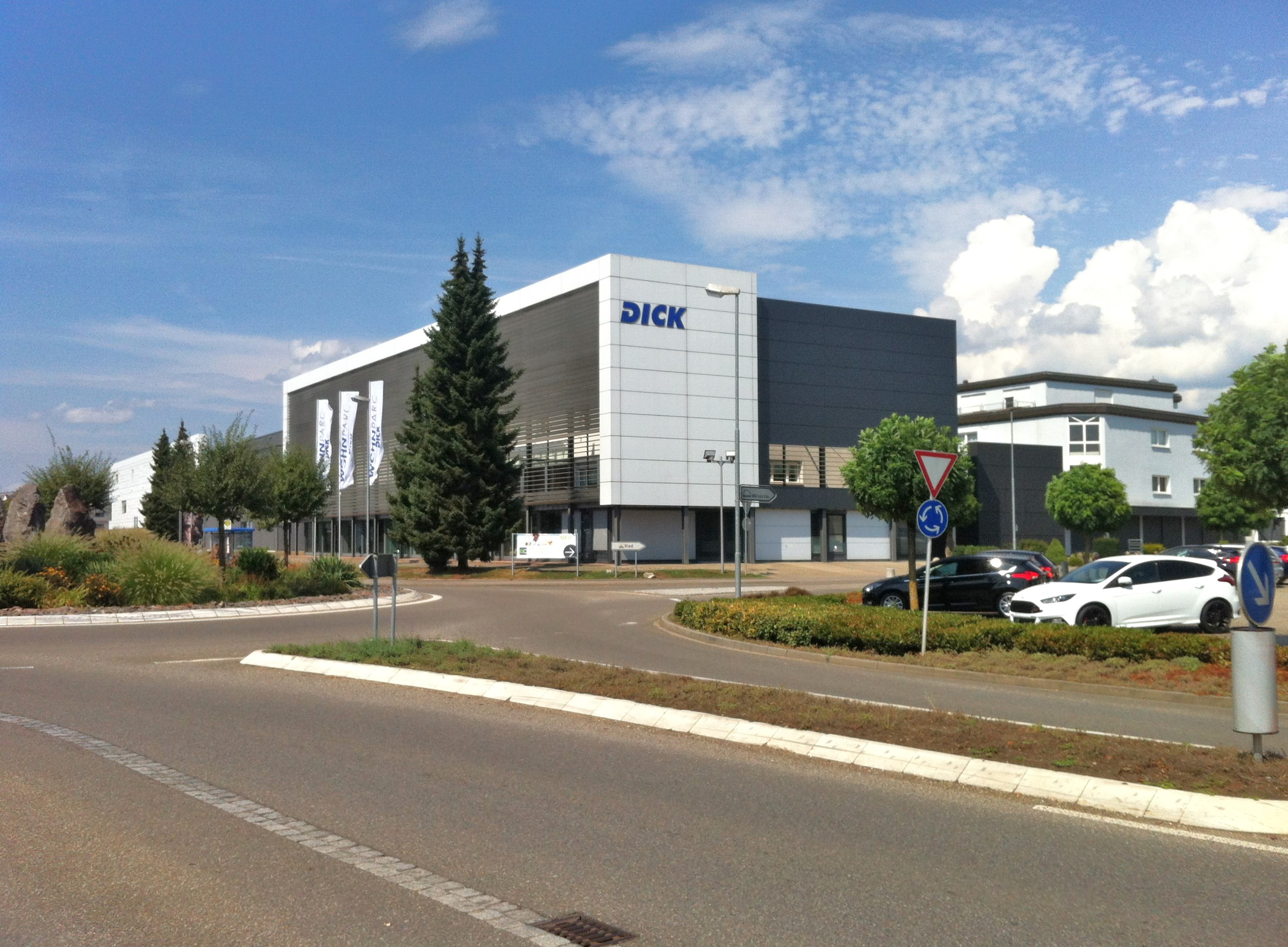 Lauchringen, Gemeinde im Landkreis Waldshut in Baden Württemberg. Möbel Dick, Ausstellungshaus.